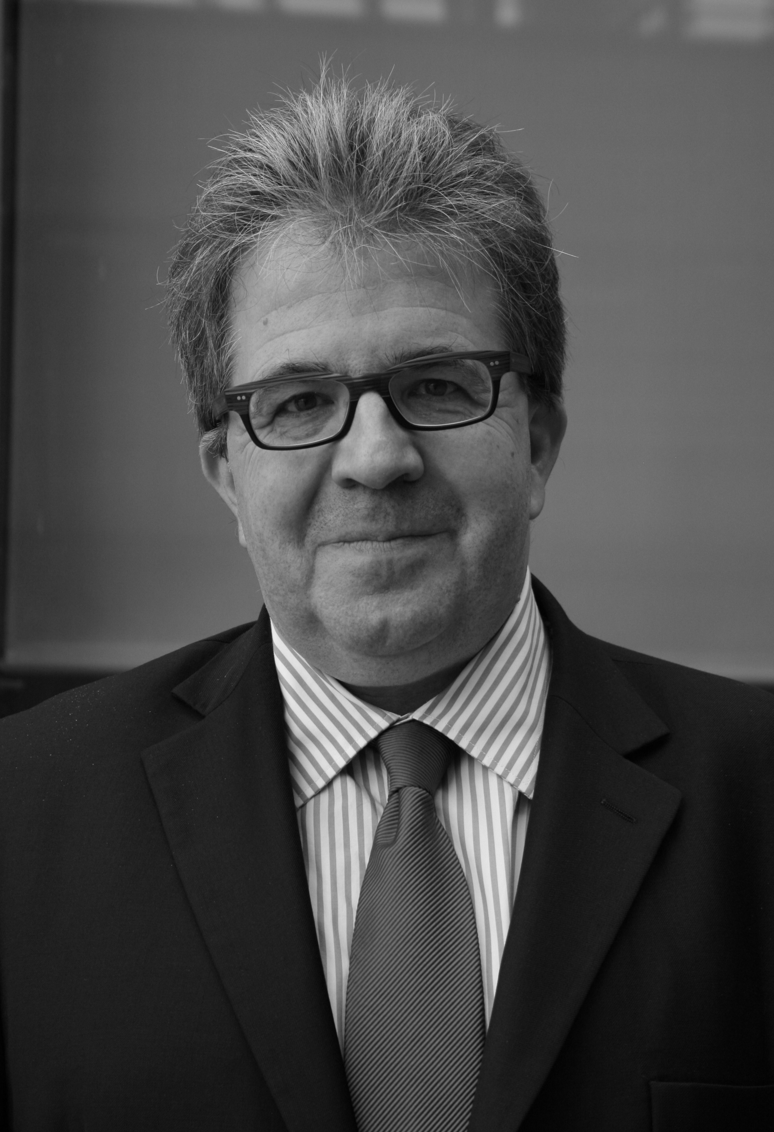 Christian Lequesne, né le 26 décembre 1962 à Vitry-le-François (Marne), est un universitaire français, directeur du Centre d'études et de recherches internationales (CERI) et professeur de politique européenne à Sciences Po.